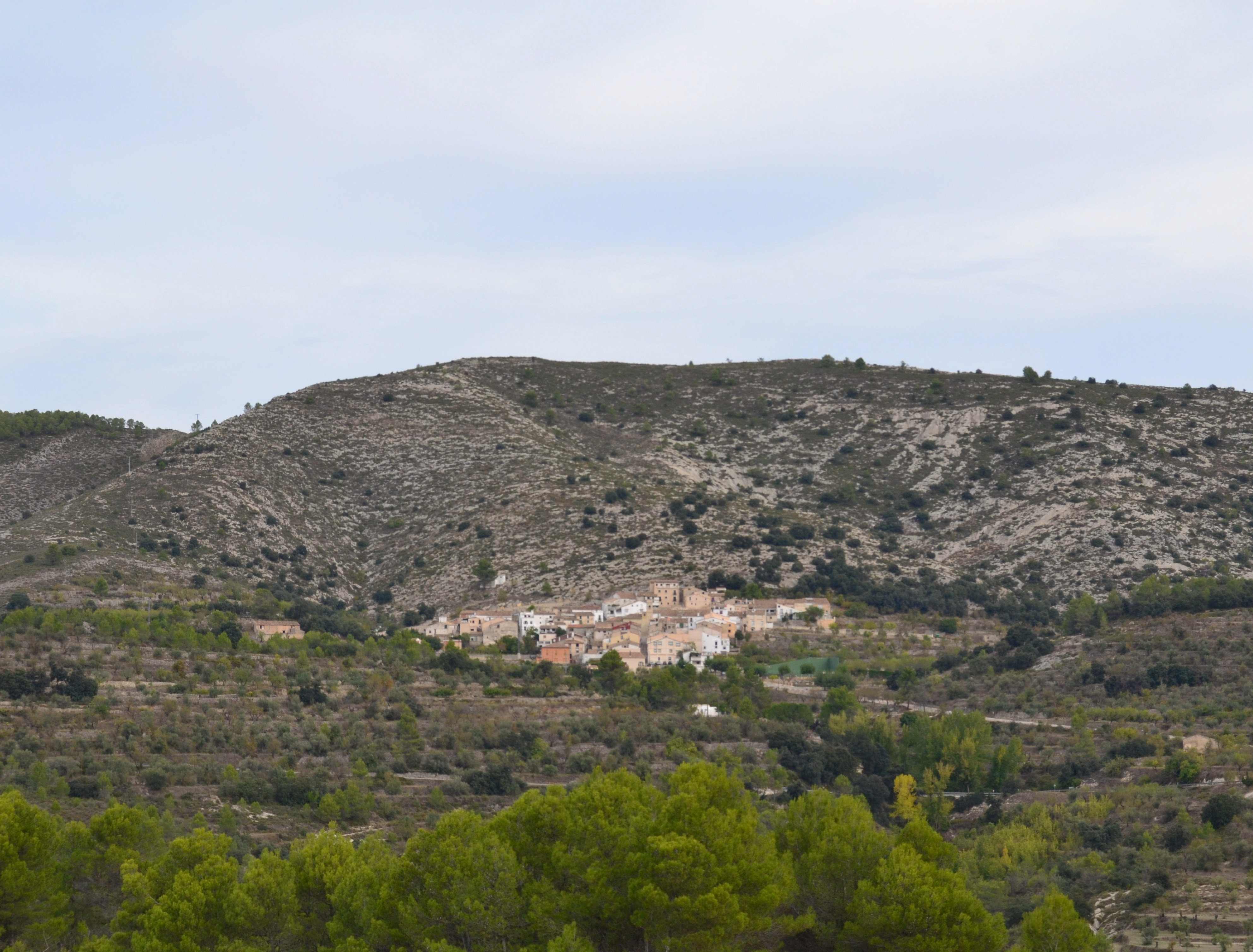 Vista de Tollos, el Comtat.